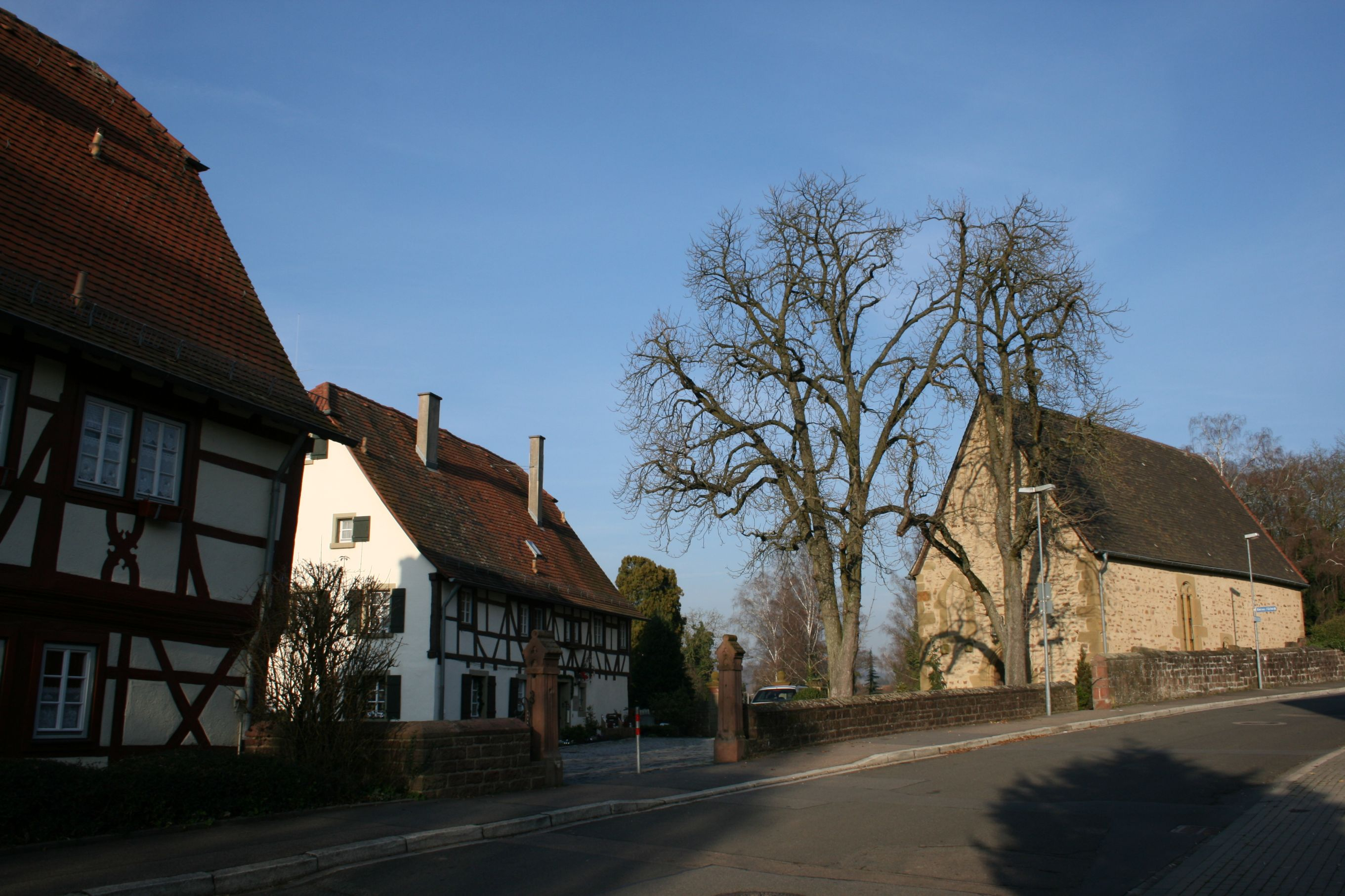 Gesamtansicht der Gutleutanlage in Mosbach. Von links: Gutleuthaus, Elendshaus und Gutleutkapelle.